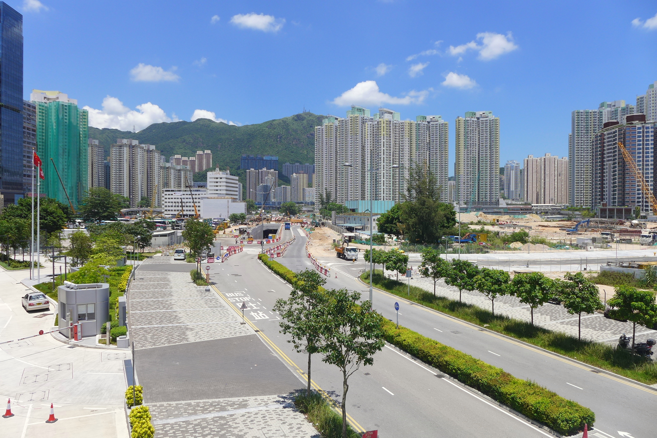 Concorde Road